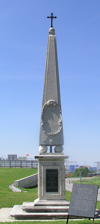 Kugelkreuz in Schwechat, Treffpunkt von Leopold I. und König Jan Sobieski im Jahre 1683, anlässlich des Endes der Zweiten Wiener Türkenbelagerung.